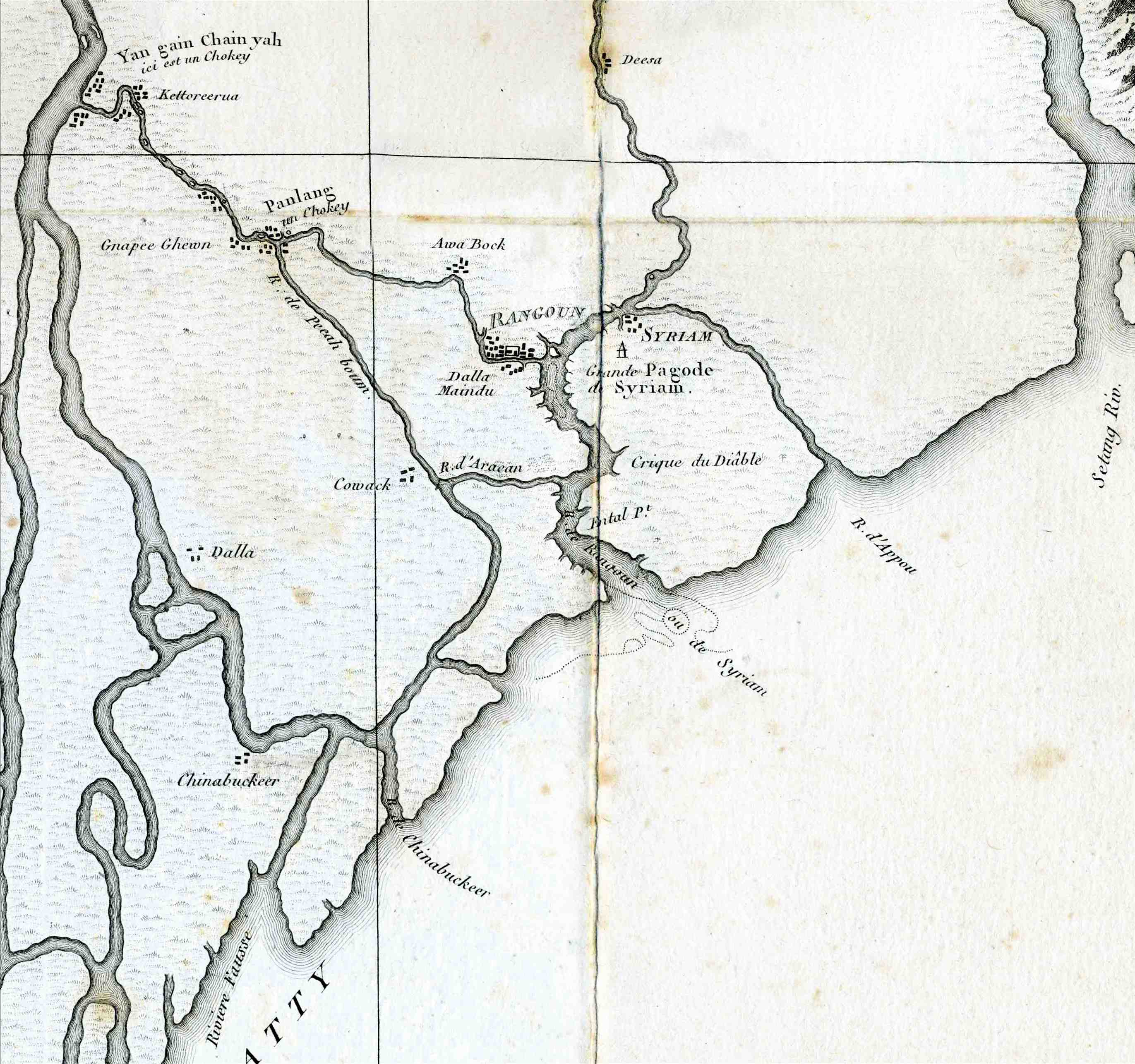 extrait de la carte de l'Irraouaddy. Dessinée en 1795, par Thomas Wood. In relation de l'embassade anglaise envoyée dans le royaume d'Ava, par la major Michel Symes. Paris, Buisson, AN IX (1800)